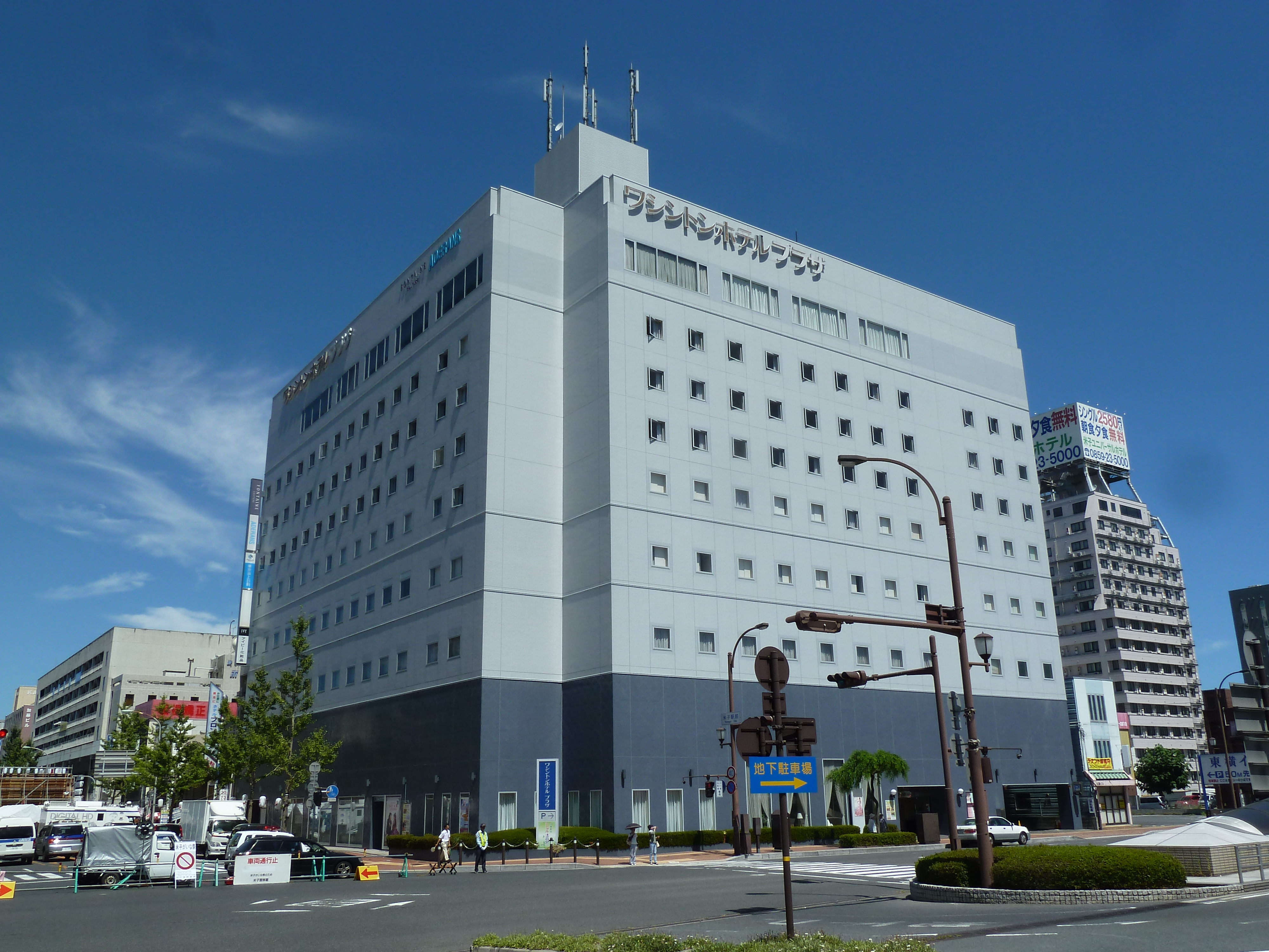 米子駅前にあるワシントンホテルプラザ